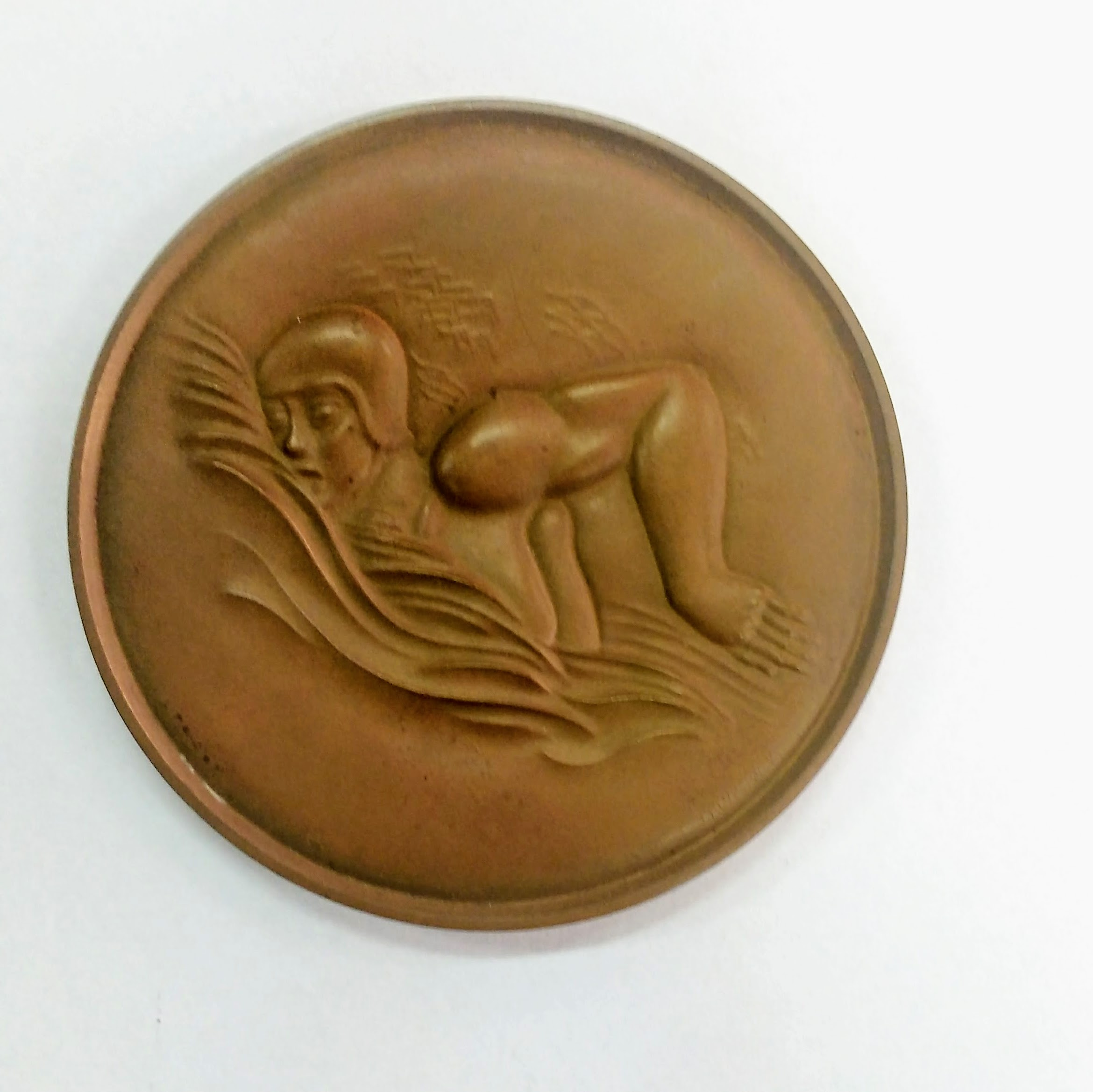 Rewers medalu za zajęcie 2 miejsca w zawodach pływackich Wojska Polskiego